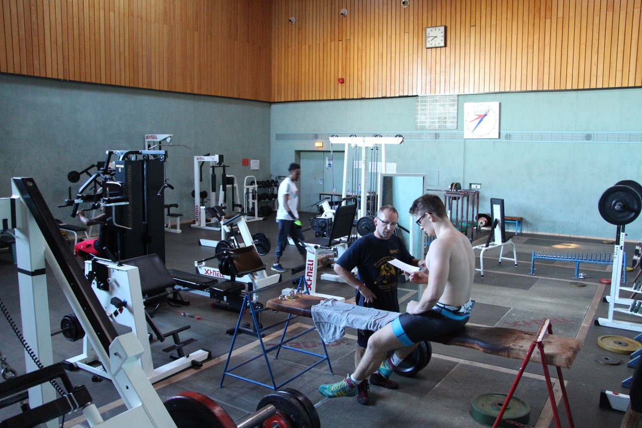 Der Kraftraum im Sportkomplex des 1. LSC